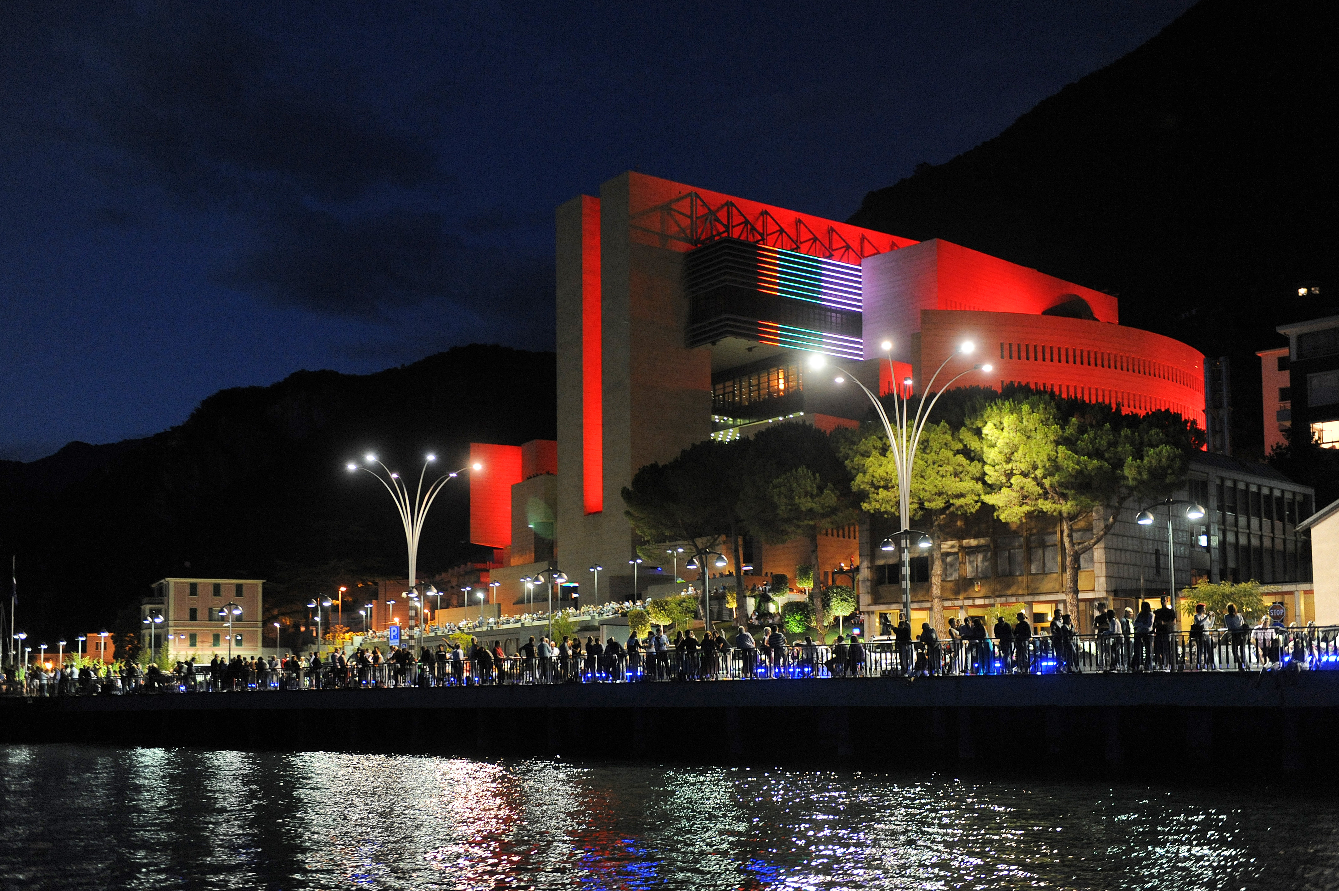 Casinò Campione d'Italia, by night.